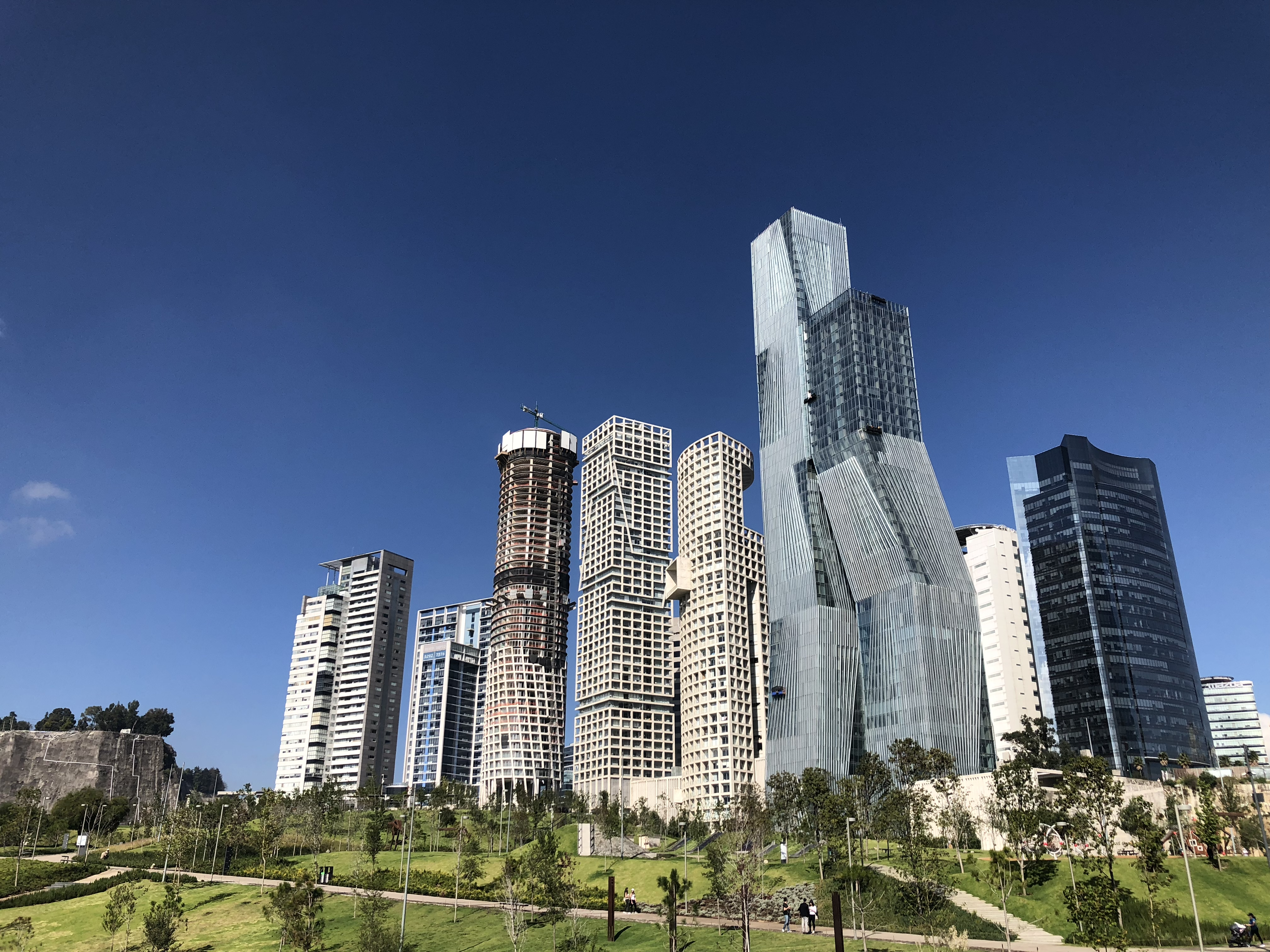 Arquitectura vista del Parque La Méxicana desde el sendero que está arriba de la Terraza Gourmet (número 7 en el mapa). También se pueden observar senderos para caminar y parte de la vegetación.